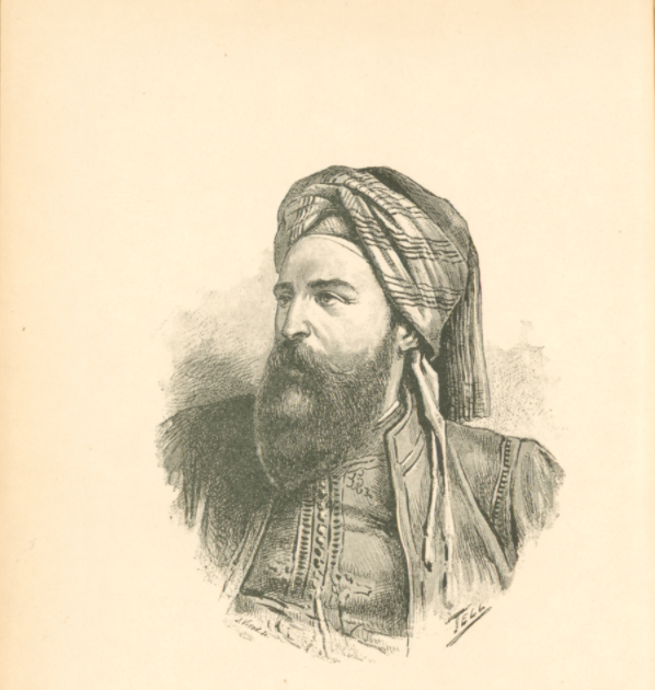 Portrait de Prisse d'Avennes en phototypie d'après une peinture à l'huile de 1872 de M. le comte de Mniszeh donnée par la famille de Prisse d'Avennes à la Bibliothèque Nationale en 1888. Bibliothèque de Grenoble.